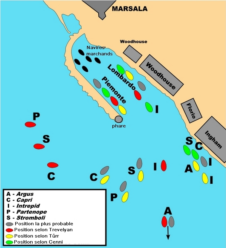 Carte en français du débarquement à Marsala de l'expédition des Mille